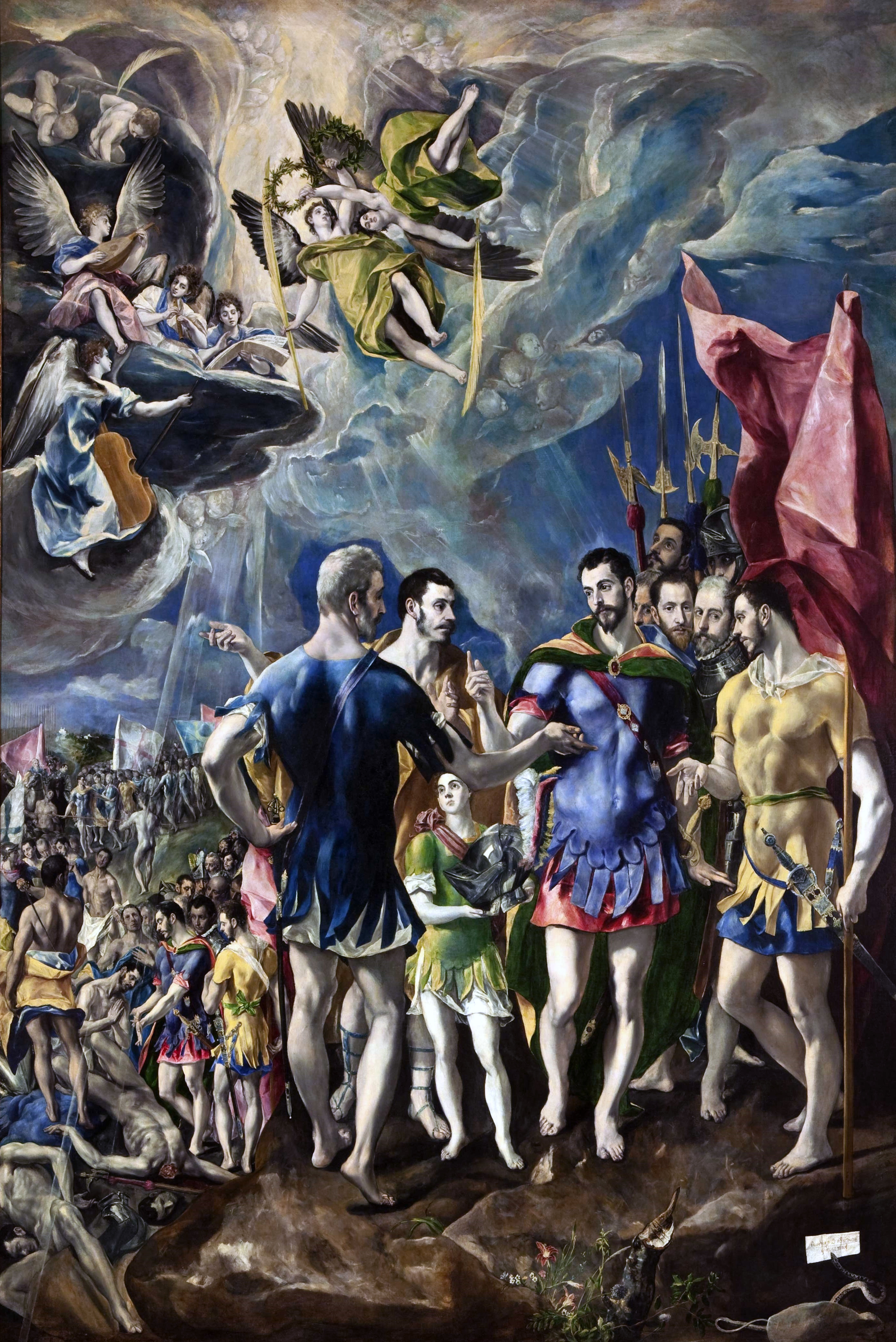 La obra representa el martirio de San Mauricio y de los soldados de la legendaria Legión Tebana, cuyos miembros fueron ejecutados por profesar el cristianismo.